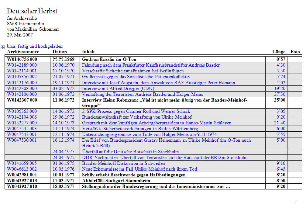 Beginn des Ablaufplans für das "SWR 2 Archivradio" anlässlich 30 Jahre Deutscher Herbst 2007. Die in der Tabelle angegebenen Takes entstammen verschiedenen ARD-Tonarchiven und liefen im Herbst 2007 als 24-stündige Endlosschleife im Internetradio In der gesamten Länge besteht das Dokument aus 3 Seiten.